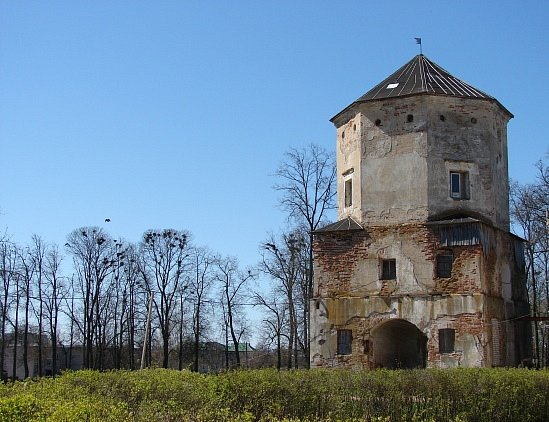 Фото путешествия по Беларуси.